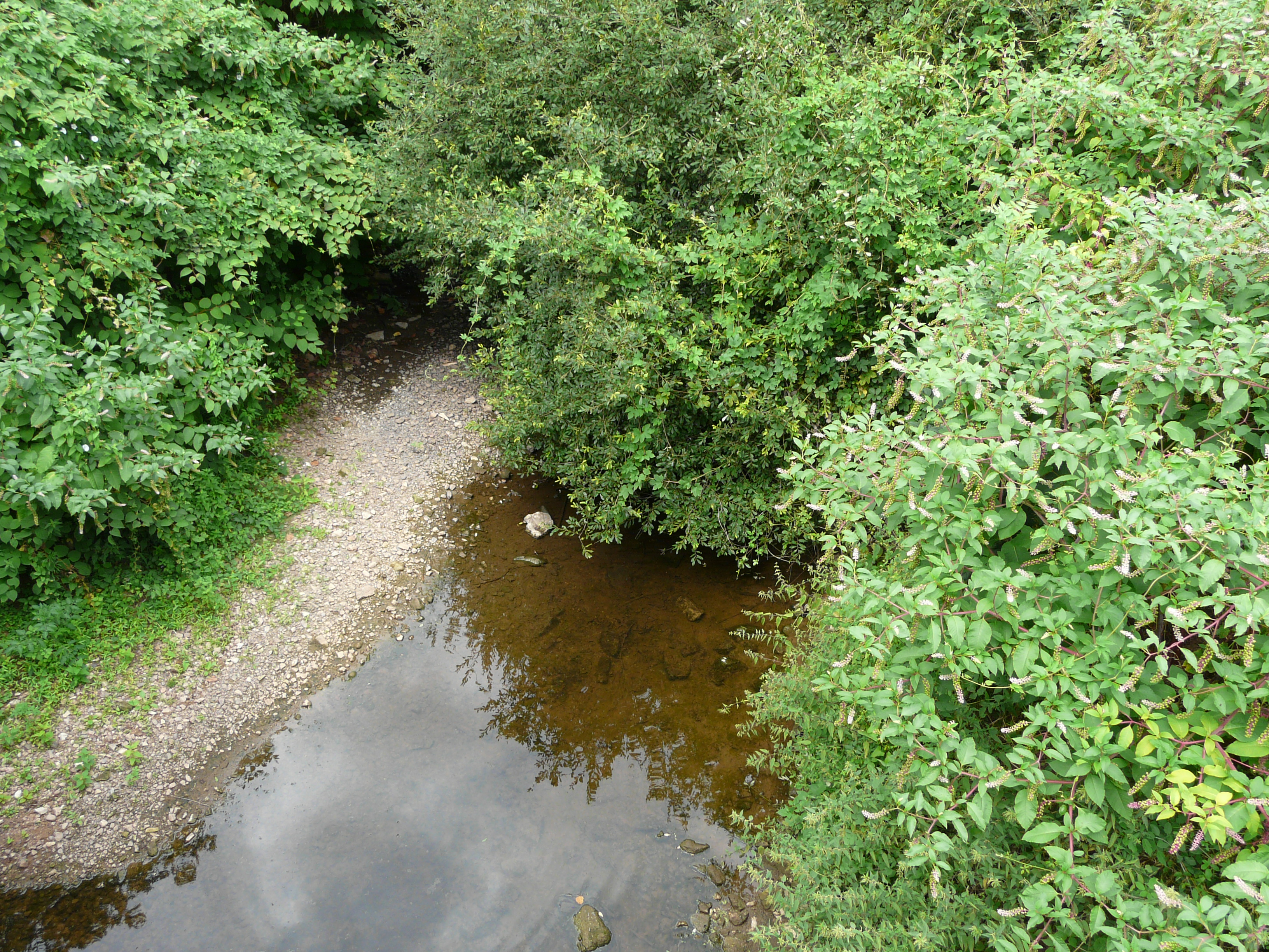 La Logne près de la Rivière de Mansac, en amont du pont de la route départementale 147, en limites des communes de Cublac (à gauche) et Mansac (à droite) ; Corrèze, France.